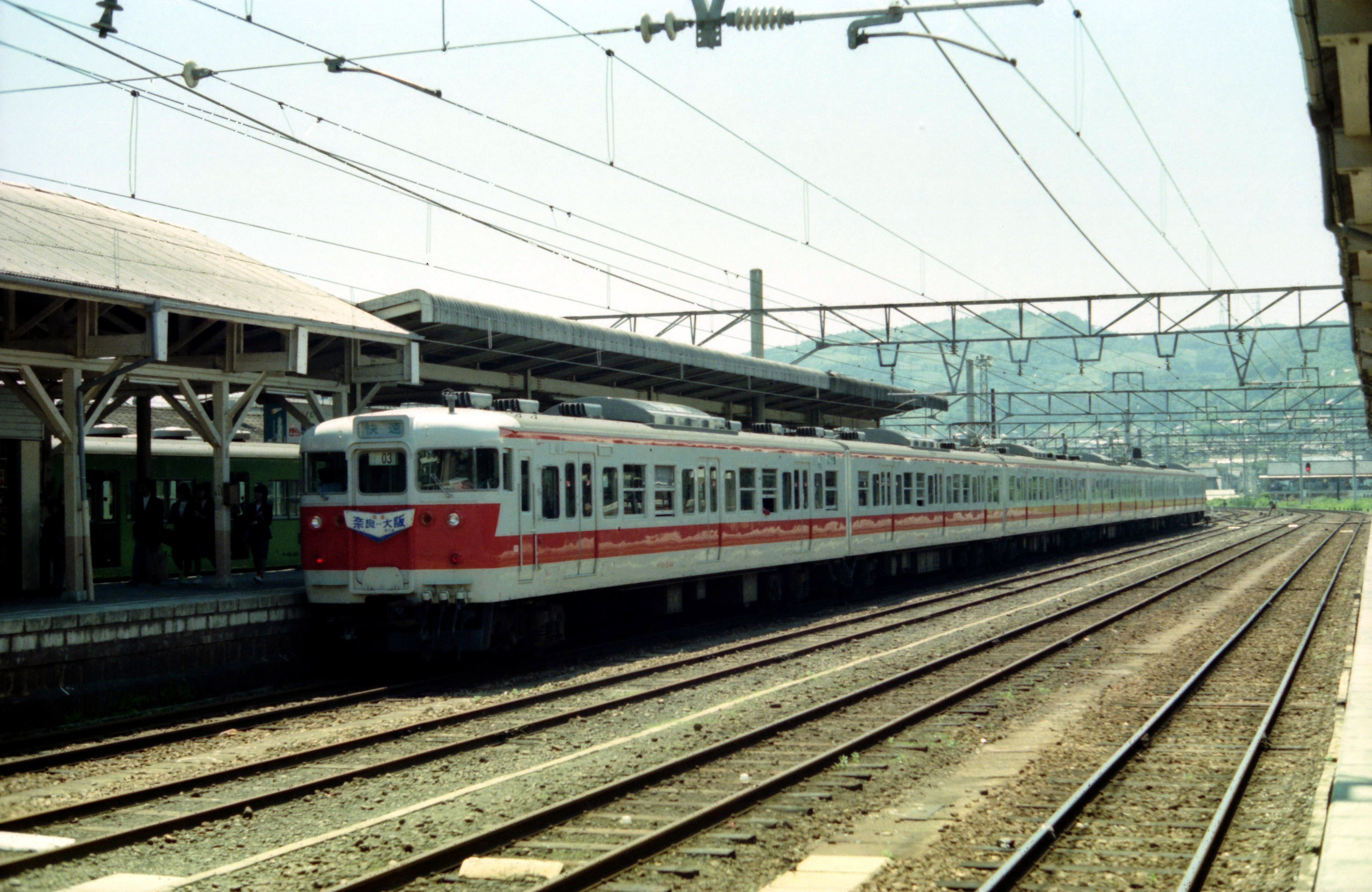 国鉄 113系電車 関西本線－大阪環状線 直通快速 王寺駅 Ｓ５５※車両先頭部には「快速 奈良↔大阪（環状線）」と書かれた、大阪環状線沿線への直通列車を示すヘッドマークが掲出されている。1989年3月のダイヤ改正により221系に転換され大和路快速になったため113系の使用は中止された。